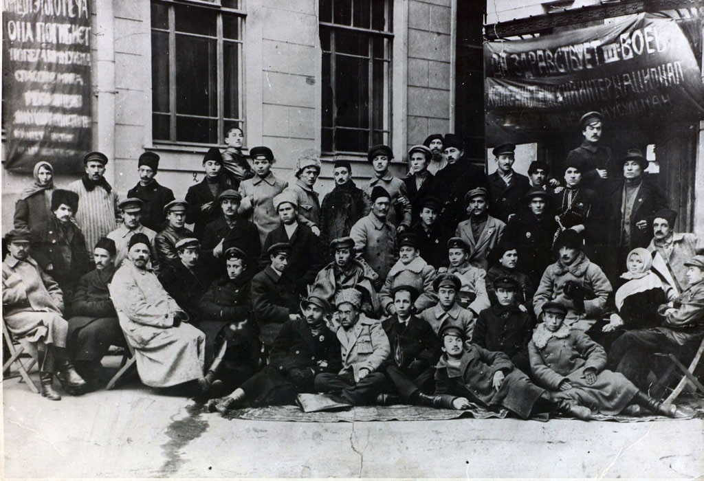 Mirsaid Sultangaliyev Doğu Halkları Komünist Örgütleri Birinci Tüm-Rusya Kongresi'nde. Tarih 1918 (Sultangaliyev ayakta duran ilk sıra en sağdan ikinci)